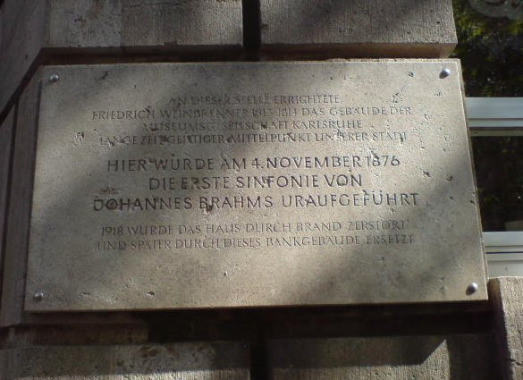 Tafel an der Stelle der Uraufführung der 1. Sinfonie von Johannes Brahms Heute: Kaiserstr. 90, 76133 Karlsruhe Text: AN DIESER STELLE ERRICHTETE FRIEDRICH WEINBRENNER 1813-1814 DAS GEBÄUDE DER MUSEUMSGESELLSCHAFT KARLSRUHE LANGE ZEIT GEISTIGER MITTELPUNKT UNSERER STADT HIER WURDE AM 4.NOVEMBER 1876 DIE ERSTE SINFONIE VON JOHANNES BRAHMS URAUFGEFÜHRT 1918 WURDE DAS HAUS DURCH BRAND ZERSTÖRT UND SPÄTER DURCH DIESES BANKGEBÄUDE ERSETZT